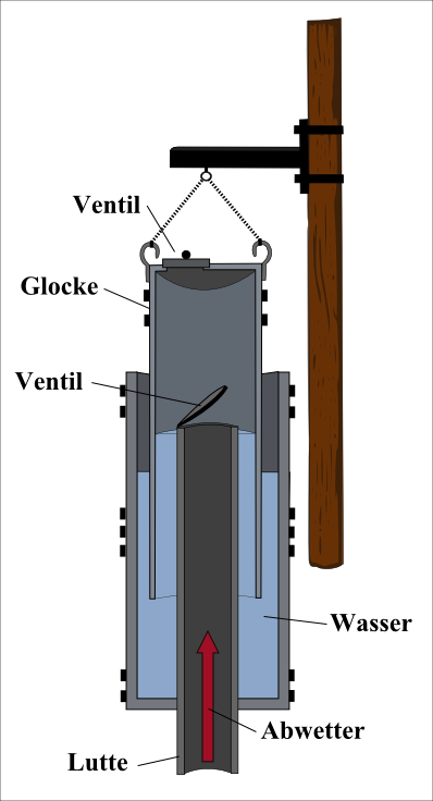 Schema eines Wettersatzes.